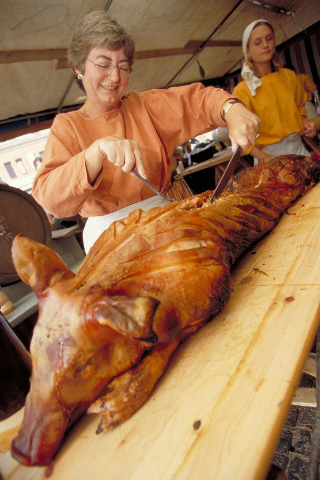 Madbod til Europæisk Middelalder Festival i Horsens sælger helstegt pattegris